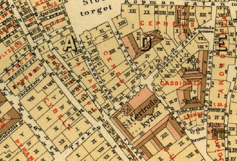 Del av Lundgrens karta över Stockholm visande kvarteren Atlas, Echo, Ceres m.fl.